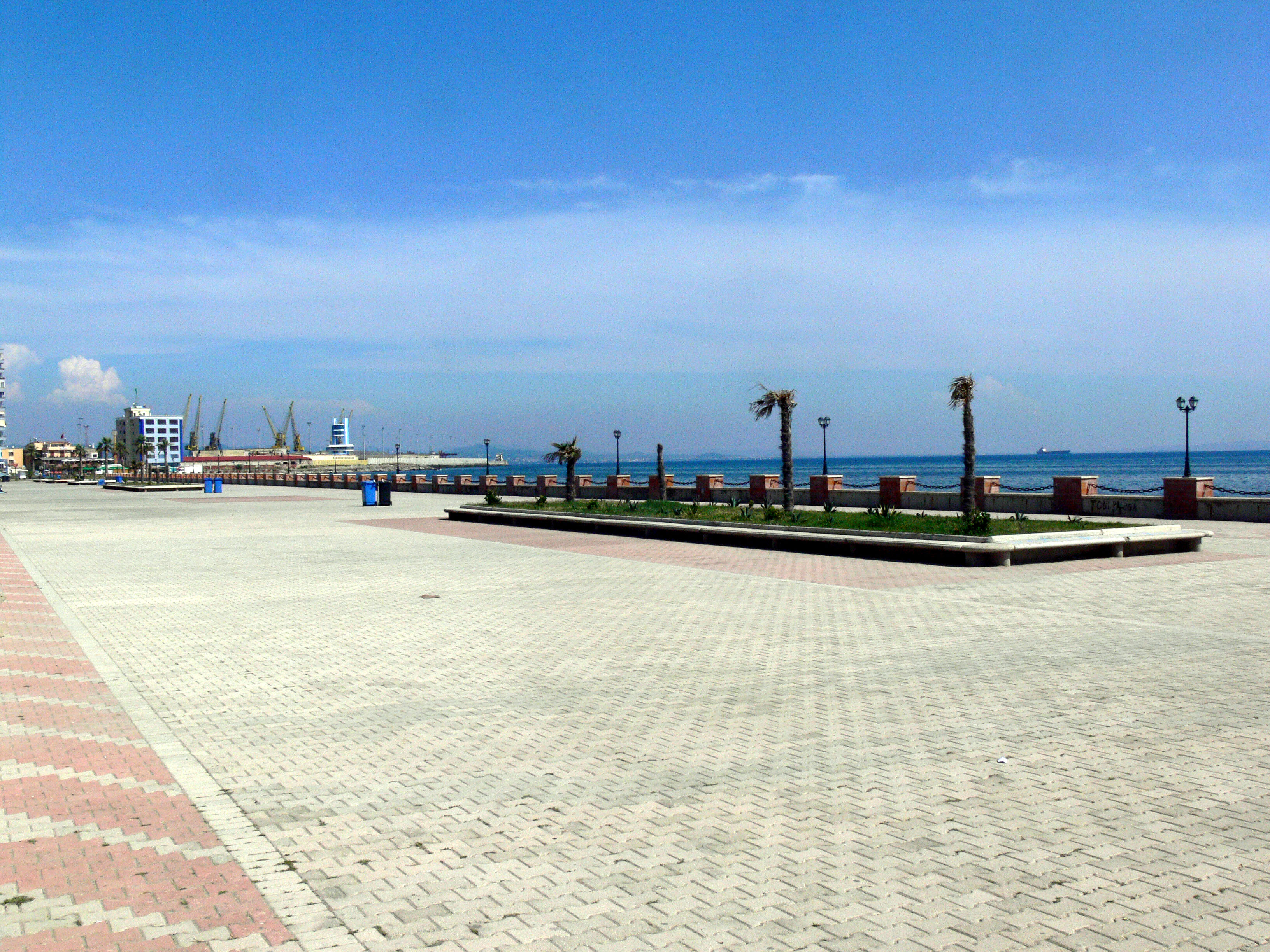 Uferpromenade in Durrës